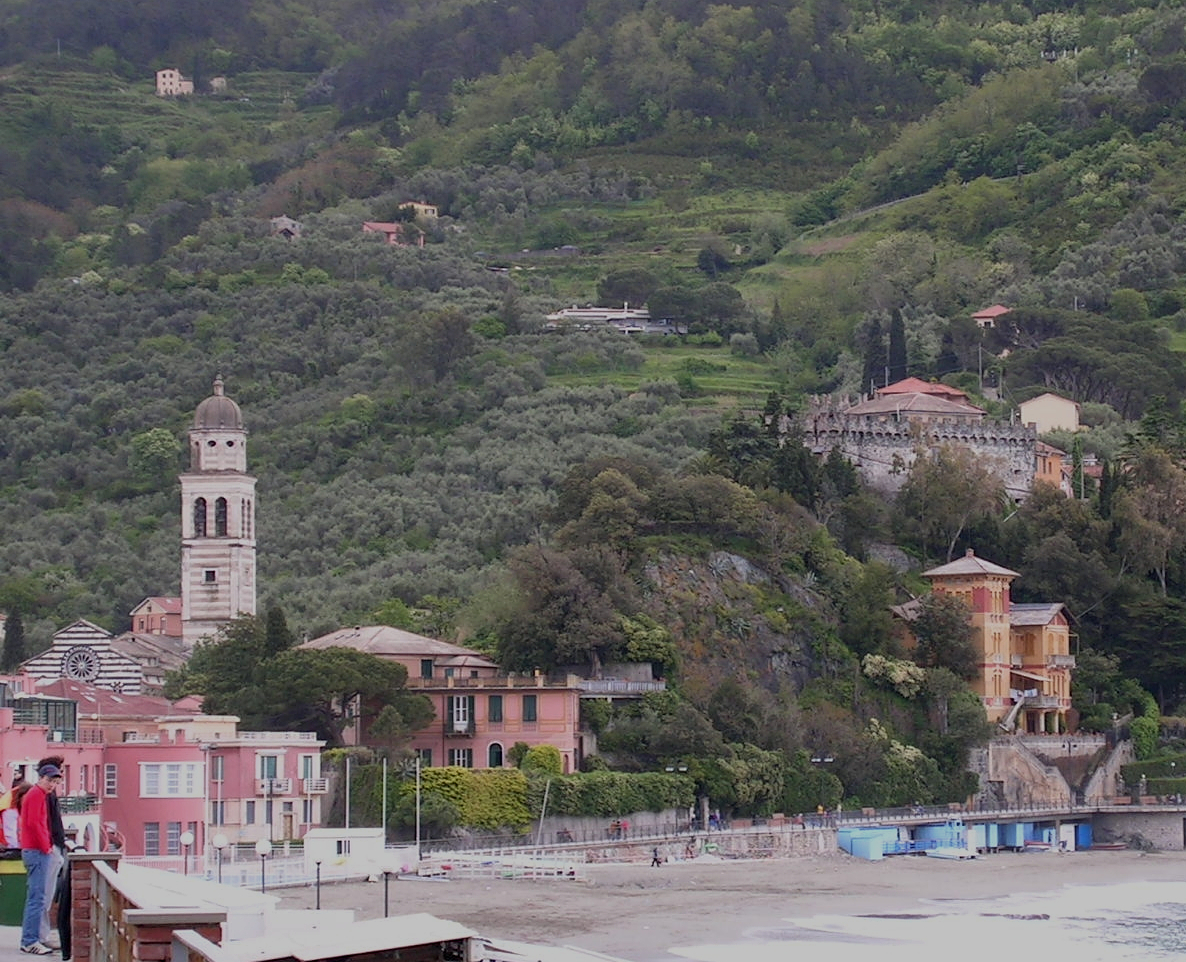 autore f.noceti